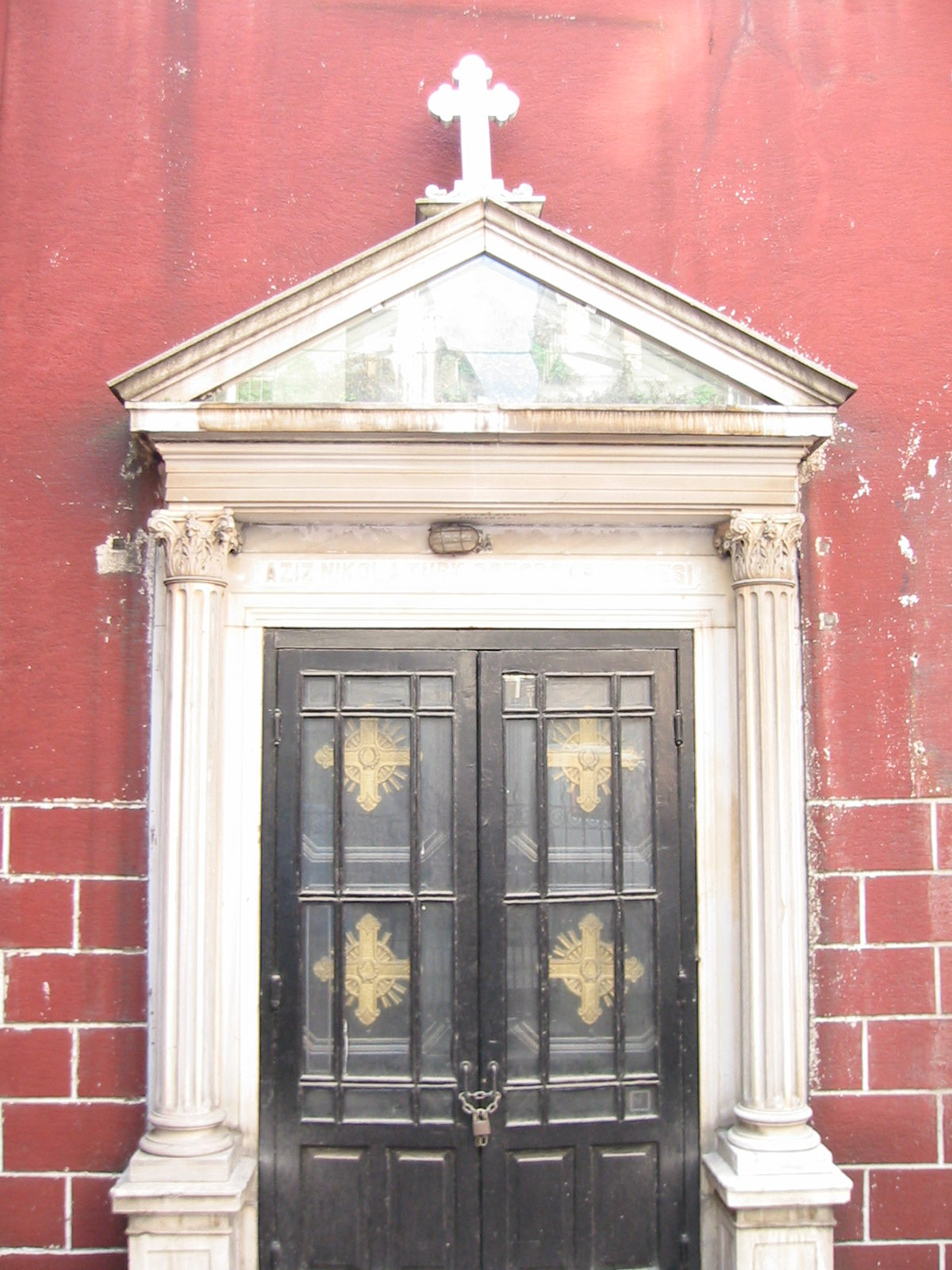 Iglesia de San Nicolas (Estambul)